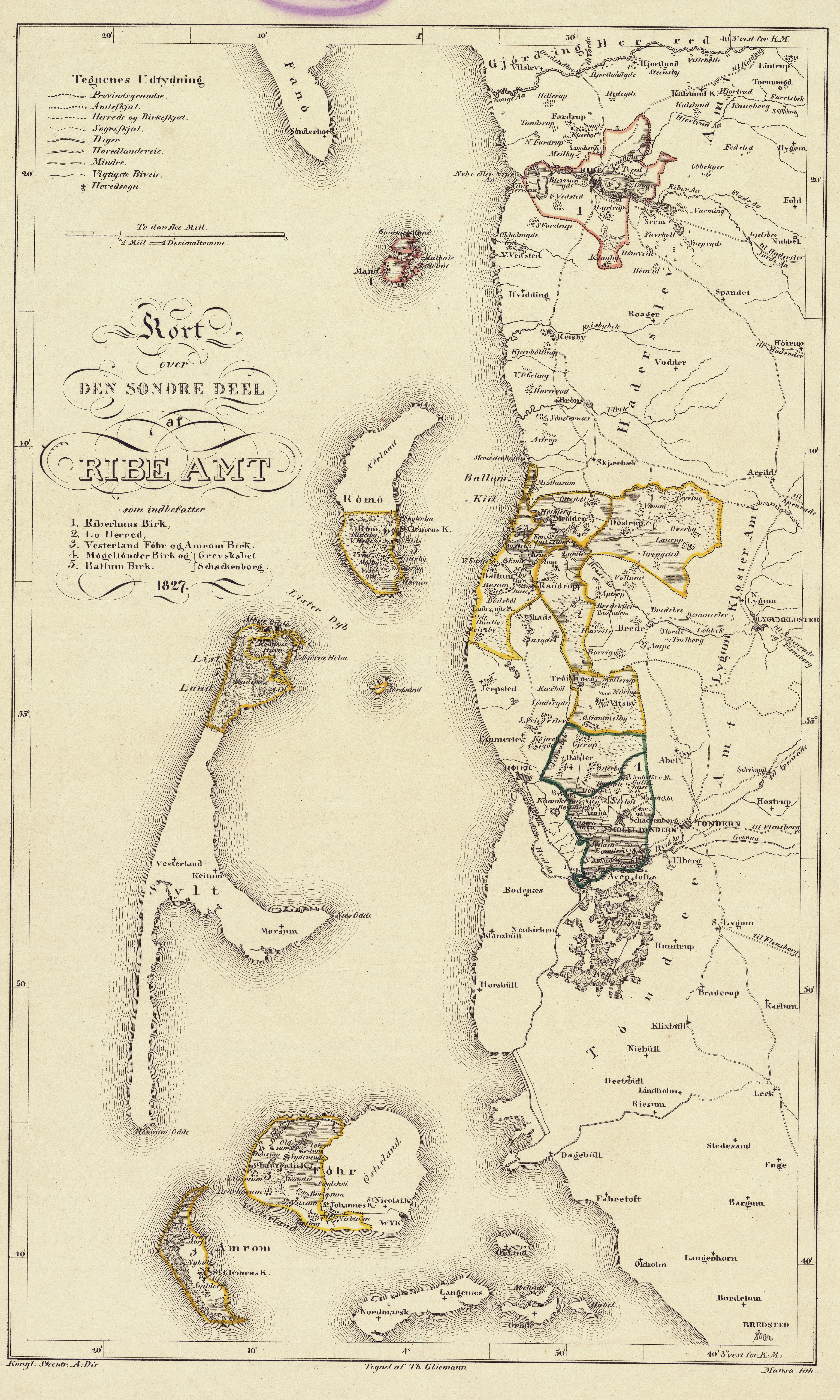 Theodor Gliemanns slesvigske amtskortː Ribe Amt, søndre del